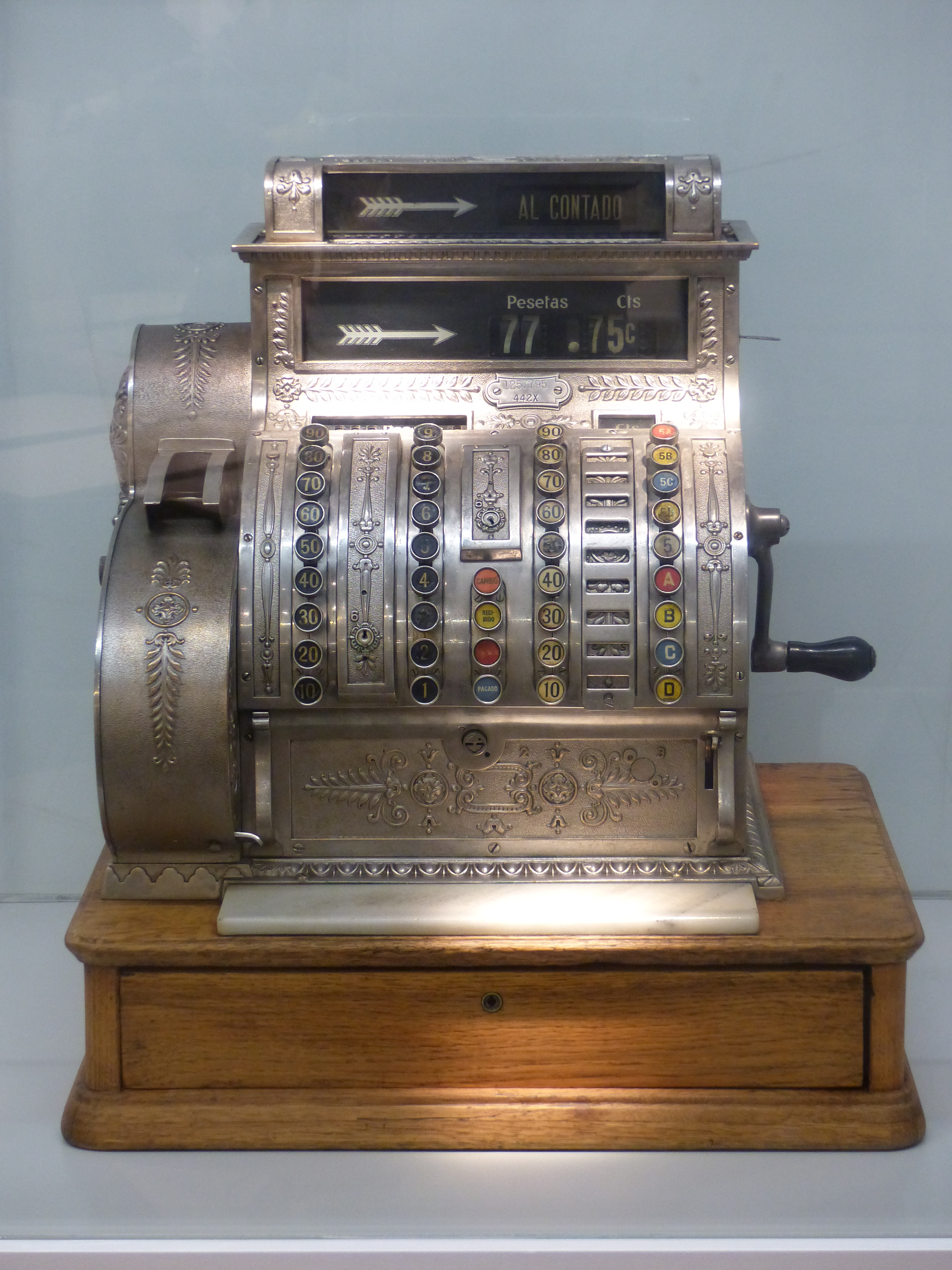 Máquina NCR expuesta en el Museo de la Biblioteca Nacional de España en Madrid.